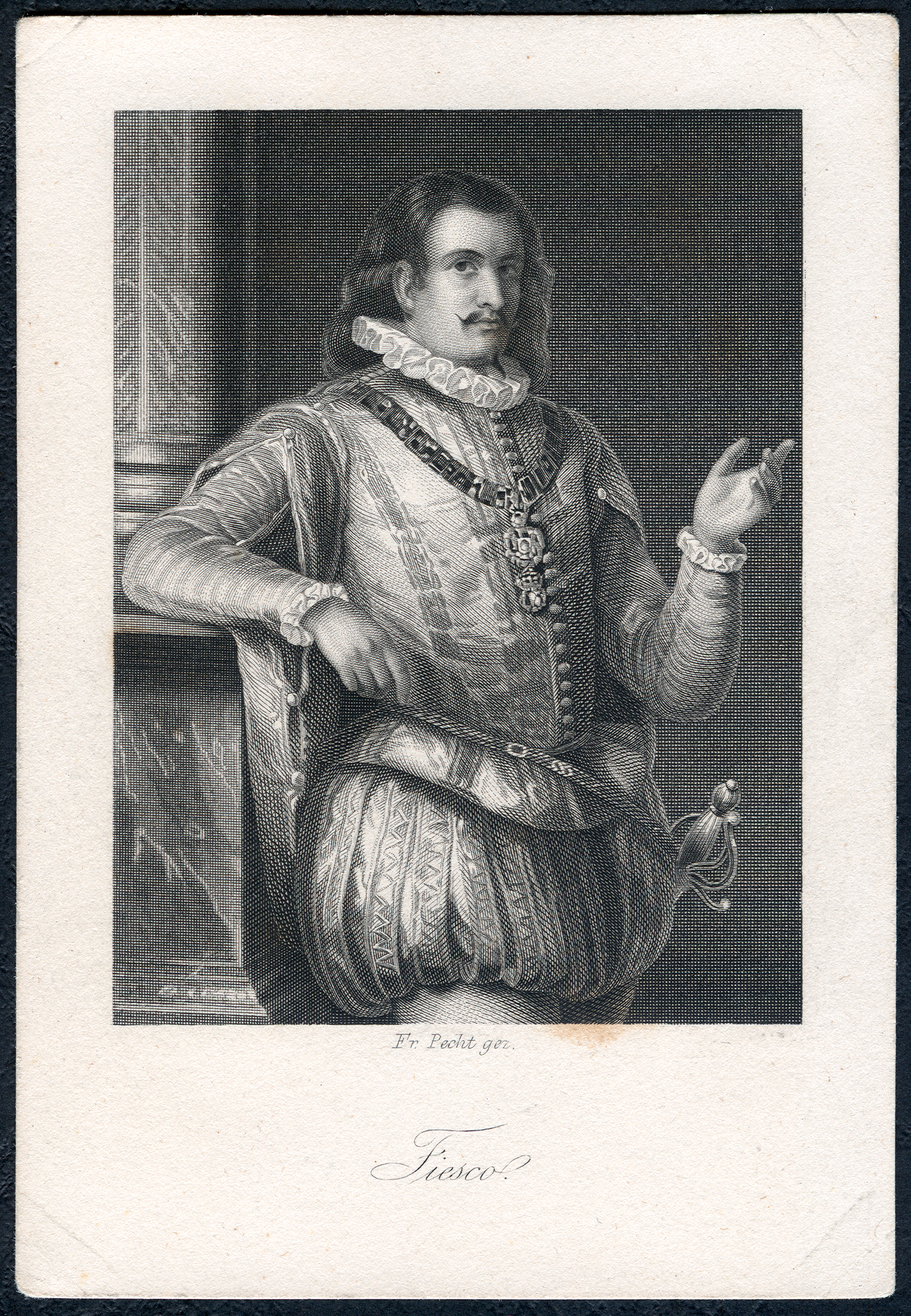 Fiesco aus Friedrich Schillers Die Verschwörung des Fiesco zu Genua, als Stahlstich gestochen von Karl Moritz Lämmel um 1859 nach einer Zeichnung von Friedrich Pecht; das untertitelte Blatt hat die Maße circa 8 cm x 11,6 cm und auf der Rückseite keine weiteren Angaben. Es gehört zu einer Serie, möglicherweise als frühes Sammelbild, die als Schiller-Galerie von Friedrich Pecht und von Arthur von Ramberg bekannt geworden ist.